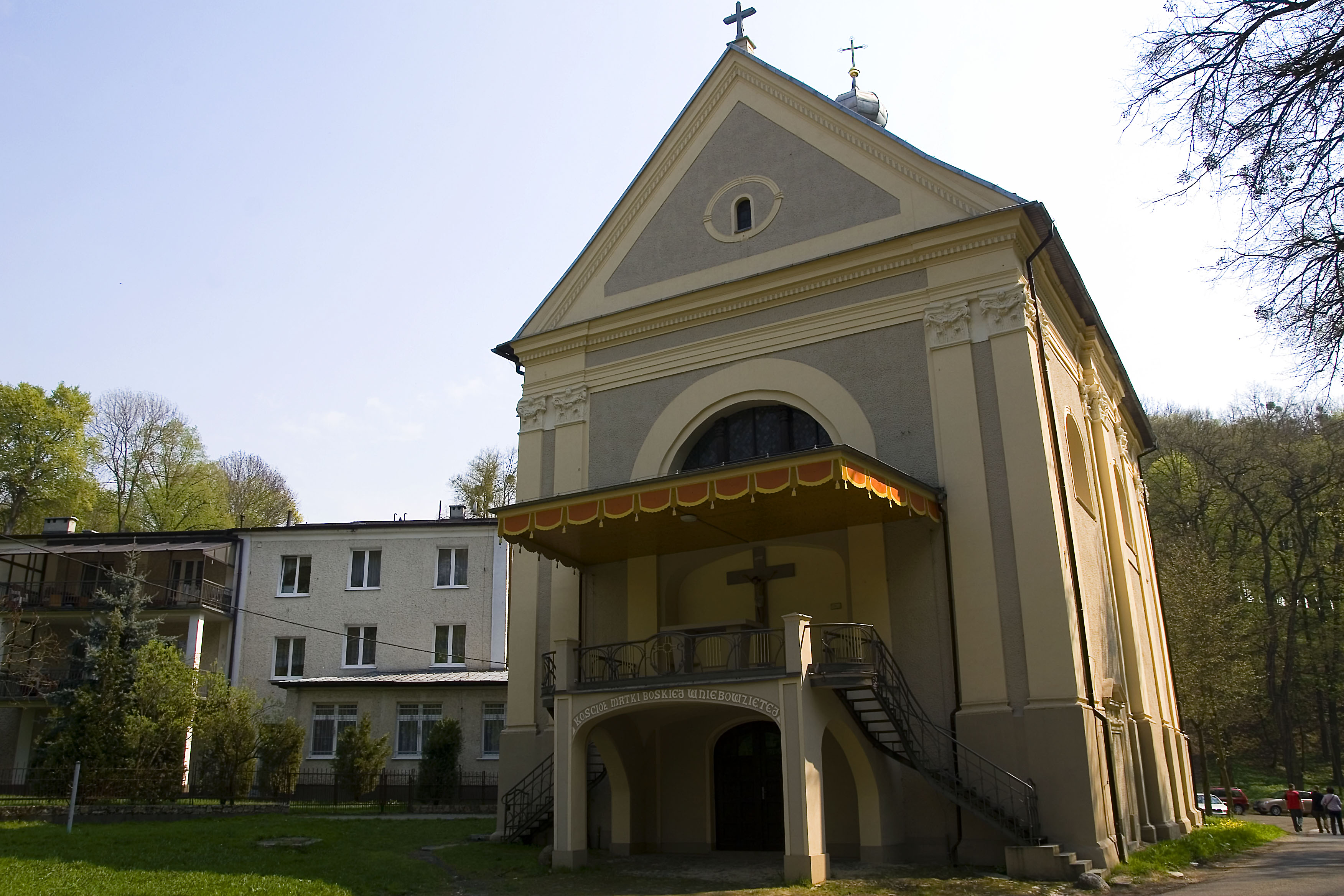 Góra św. Anny, kościół Matki Boskiej Wniebowziętej, Gmina Leśnica, powiat strzelecki